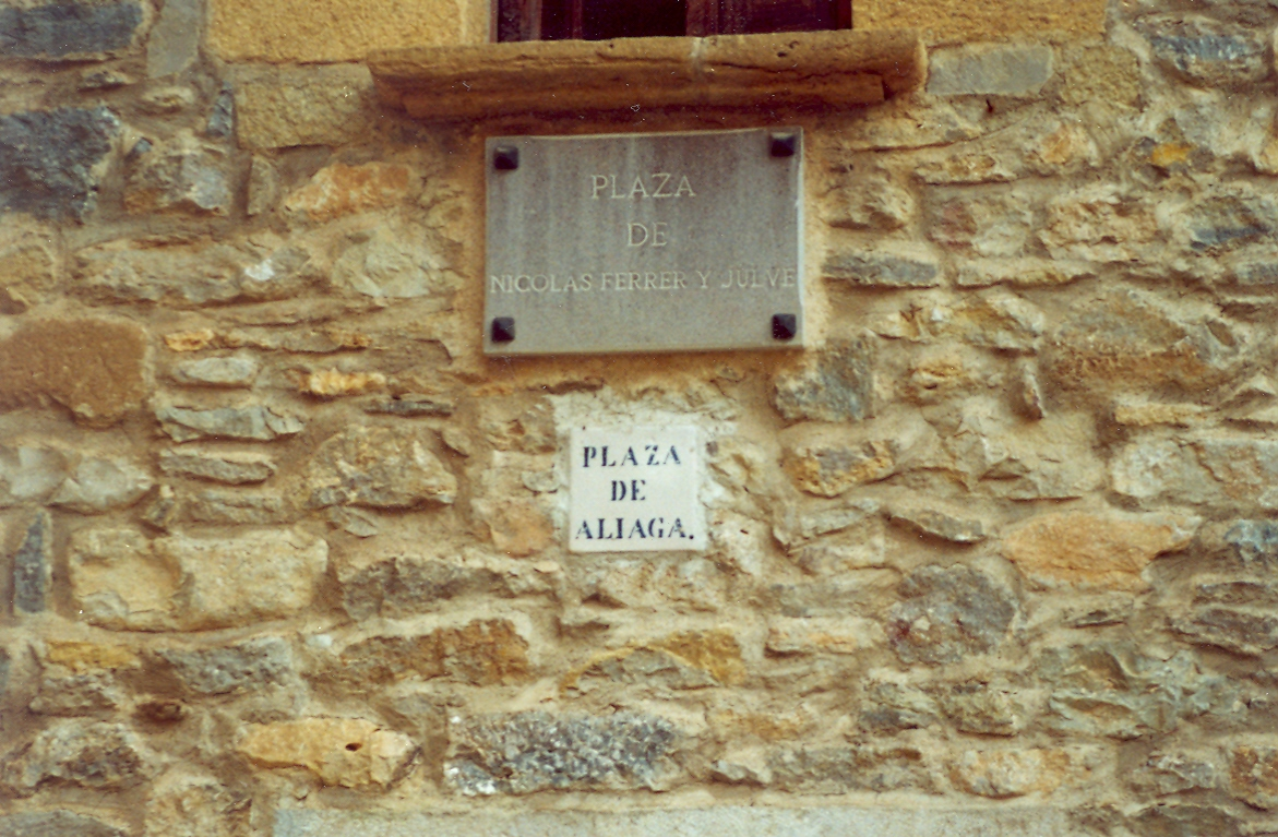 Foto de la fachada de la casa donde nació el Rector de la Universidad de Valencia, Doctor Nicolás Ferrer Julve (1898-1901), en Mirambel, Teruel, España.